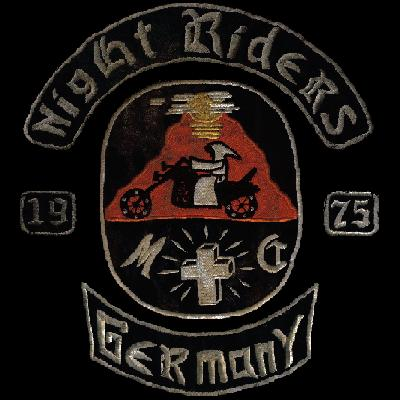 Das Color des Night Riders MC